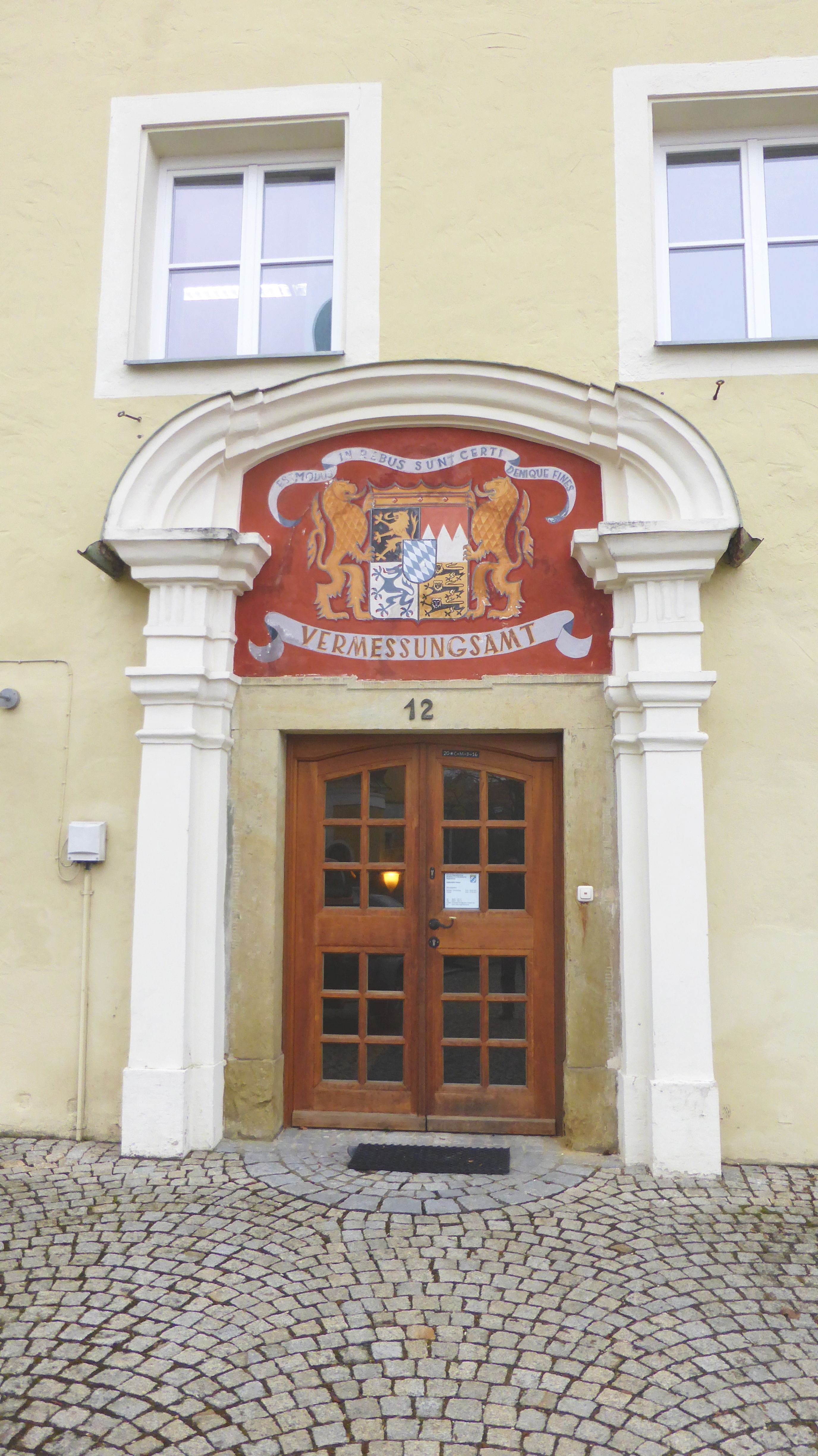 Neues Schloss (Hemau)